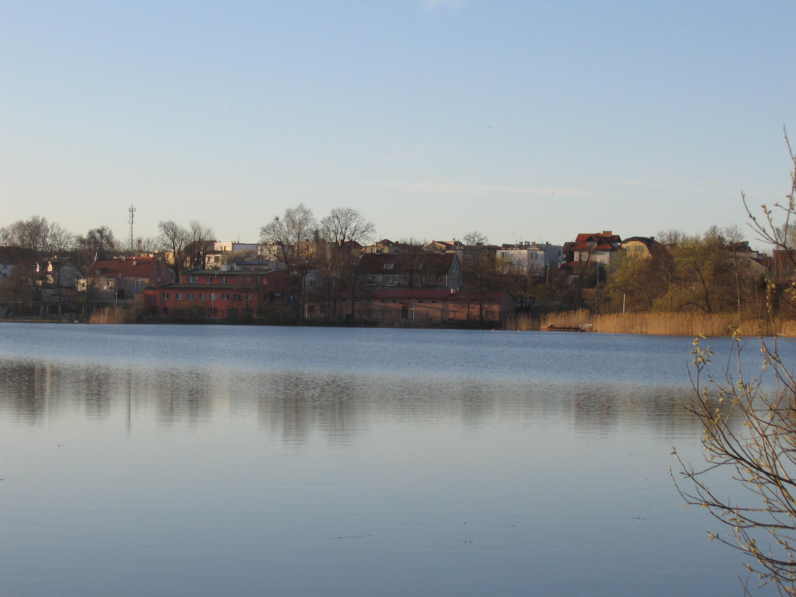 jezioro Sukiel położone w Olsztynie w dzielnicy Likusy